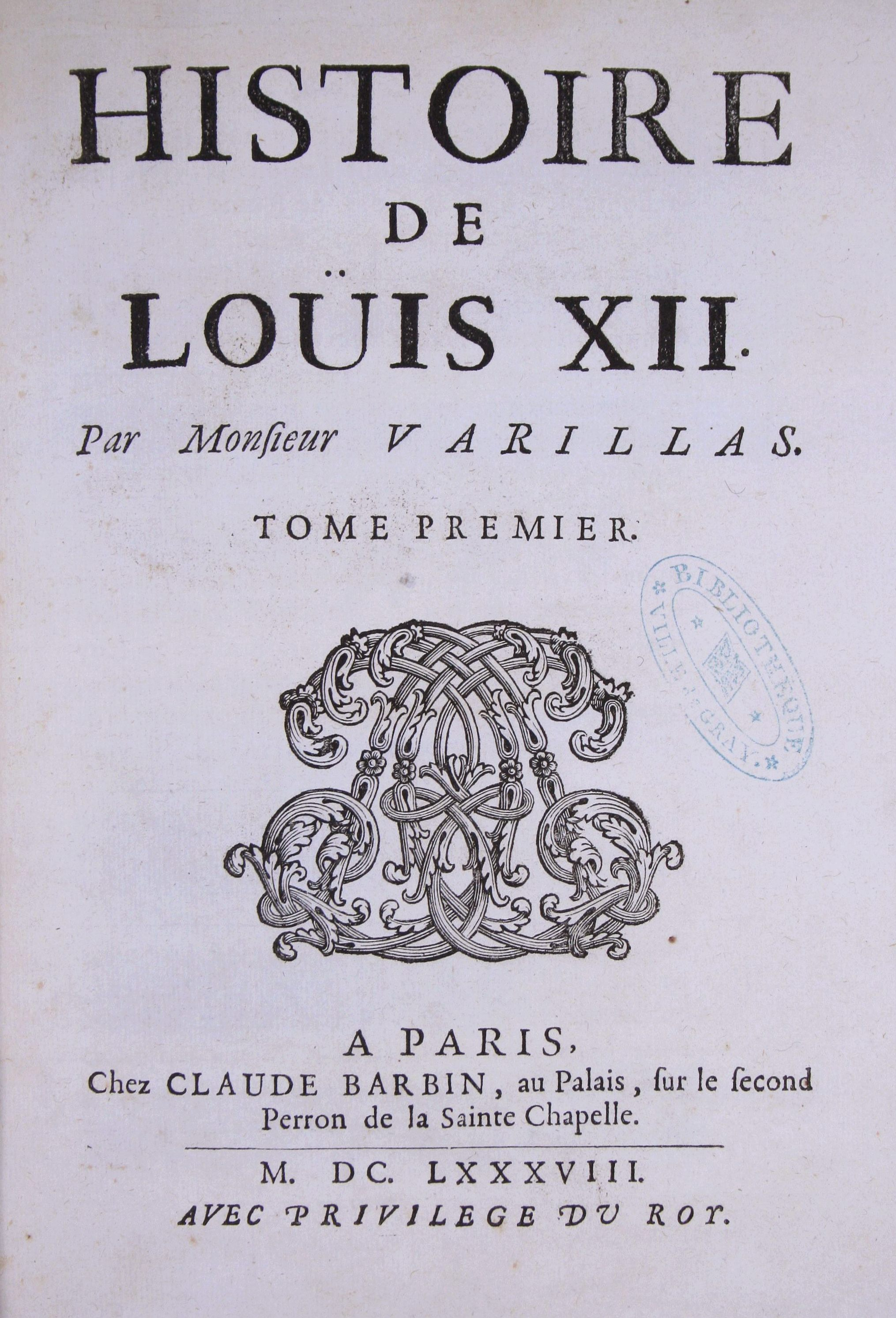 Page titre du premier tome de l'histoire de Louis XII (exemplaire de la bibliothèque patrimoniale de Gray (France)).